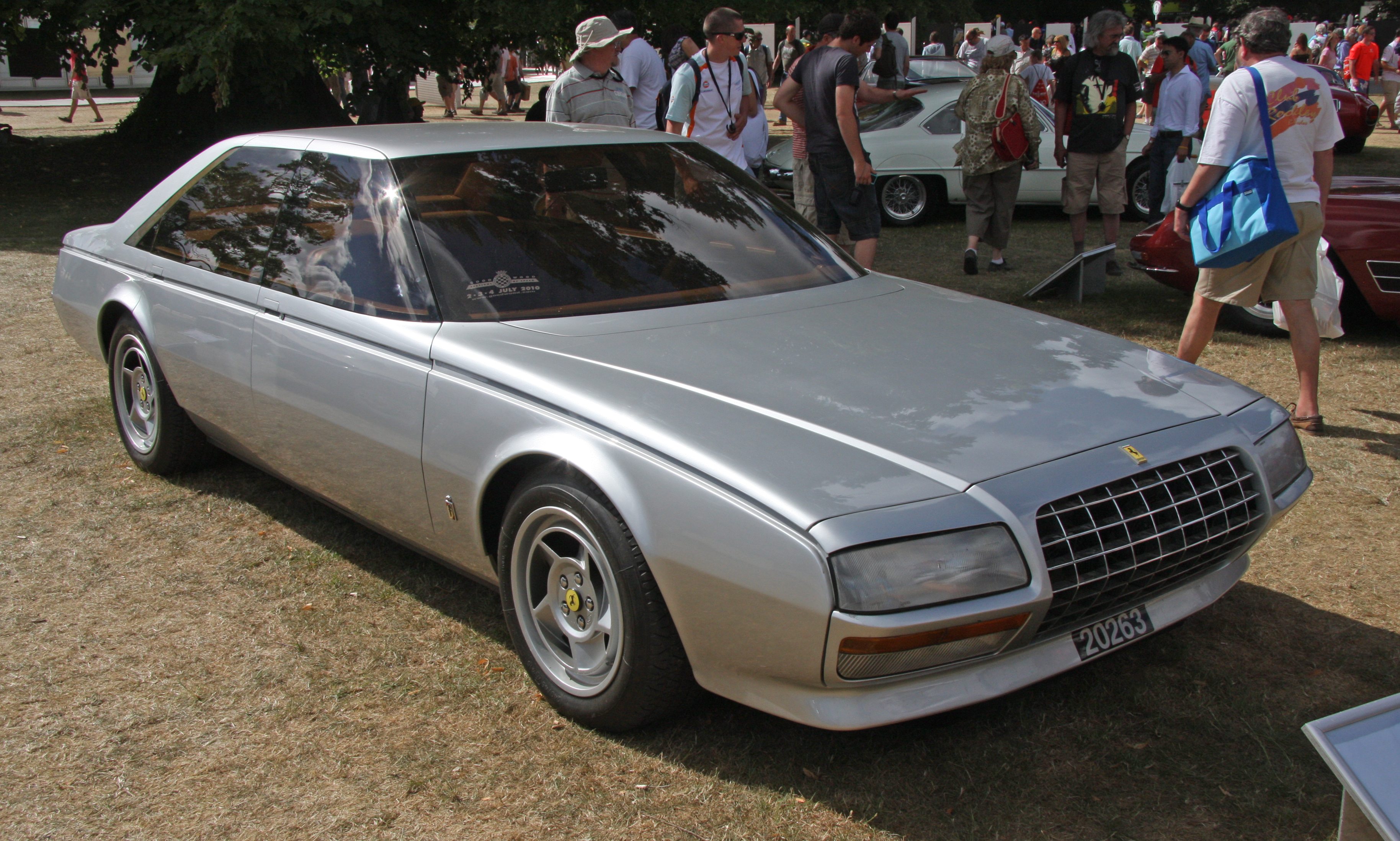 1980 Ferrari Pinin